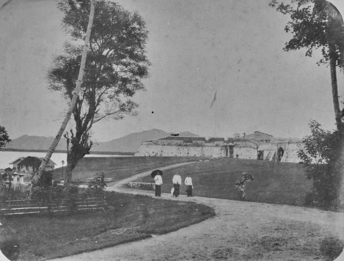 Foto. Tiga perempuan Eropa berkebaya melintas di depan Fort Marlborough di Benkoelen (sekarang Kota Bengkulu).